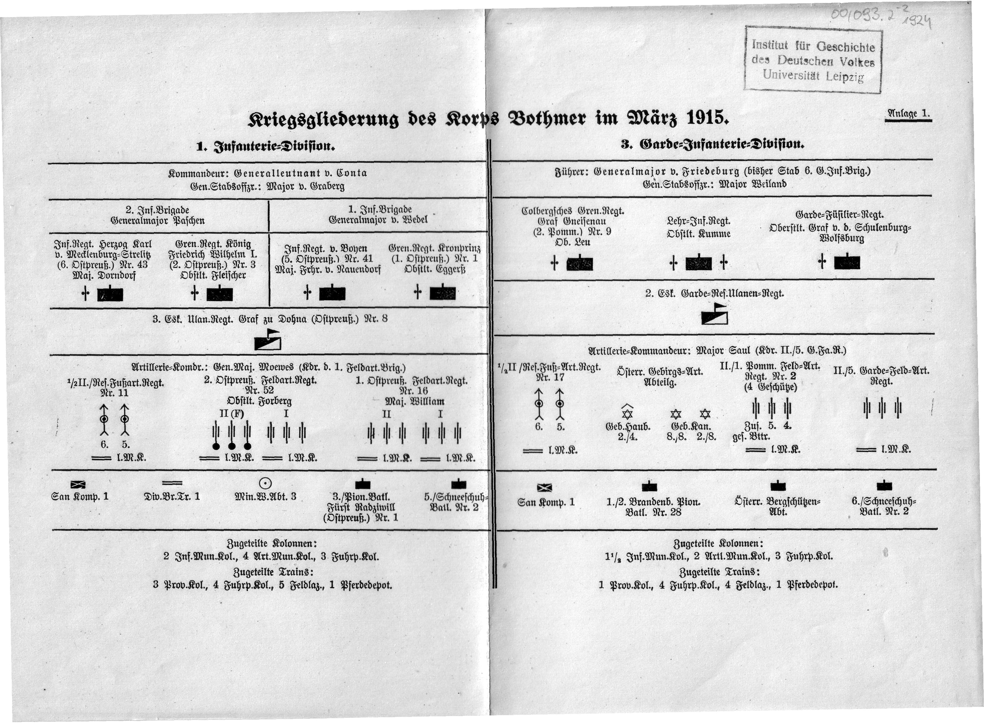 Gliederung des Koprs Bothmer